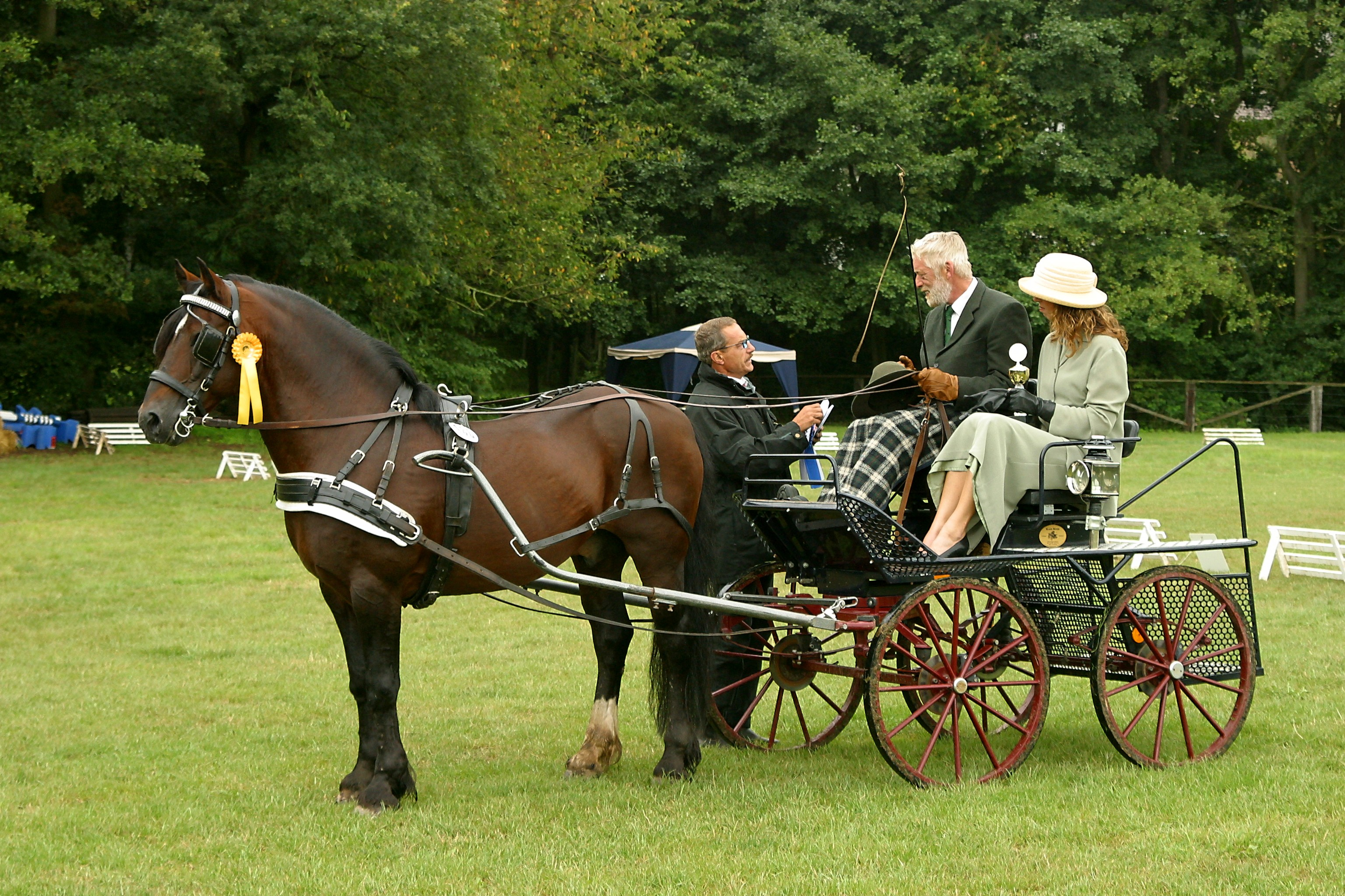 Welsh-D-Kutsche